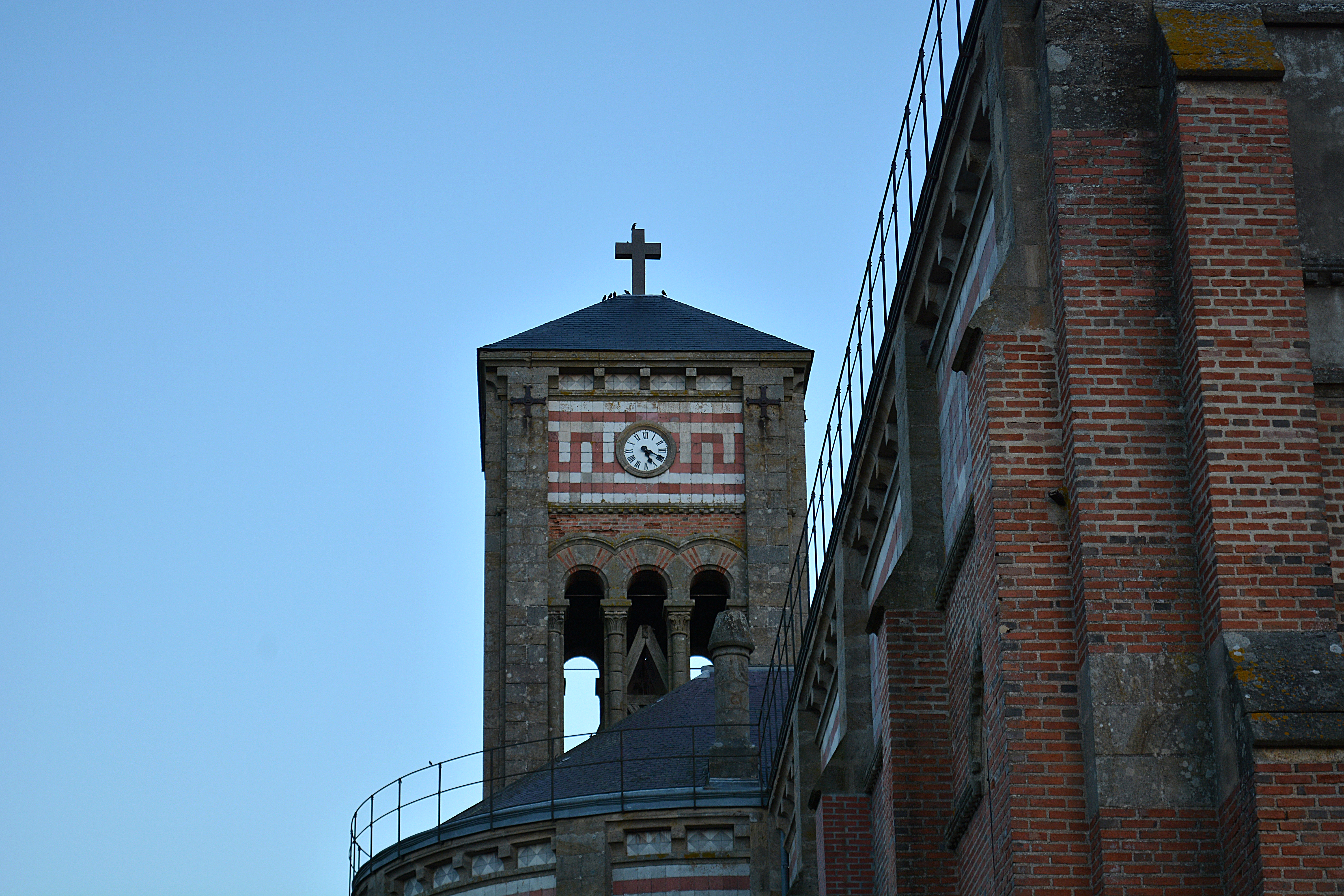 Vue de côté.